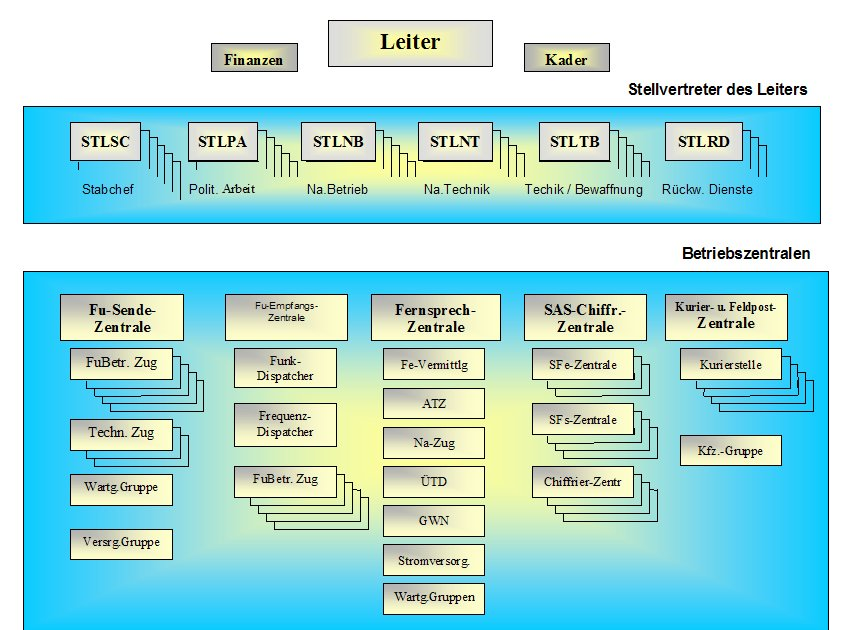 Grafische Darstellung - Struktur/Gliederung der Hauptnachrichtenzentrale (nur Nachrichten)